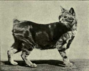 Manx cat